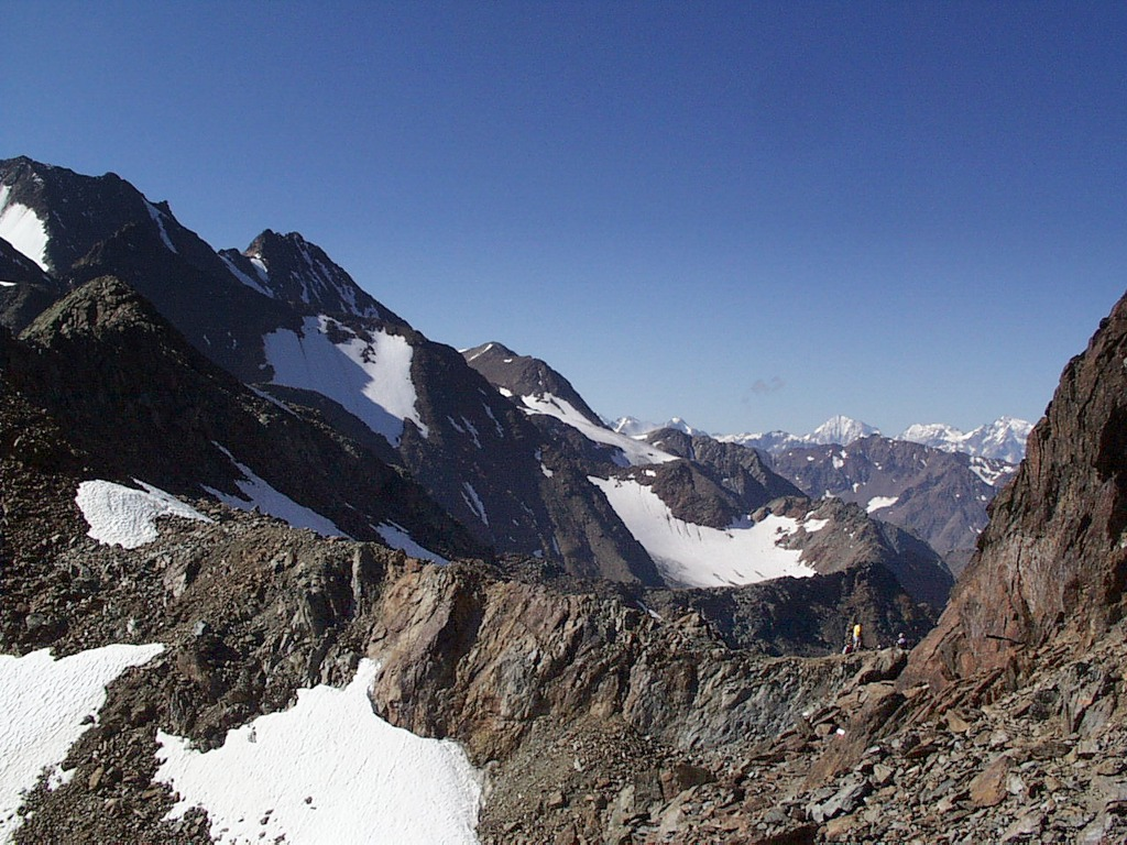 Bildstöckljoch, Übergang vom Schnalstal in das Matschertal in Südtirol. Kontakt: HATA Copyright Status: vom Autor freigestellt